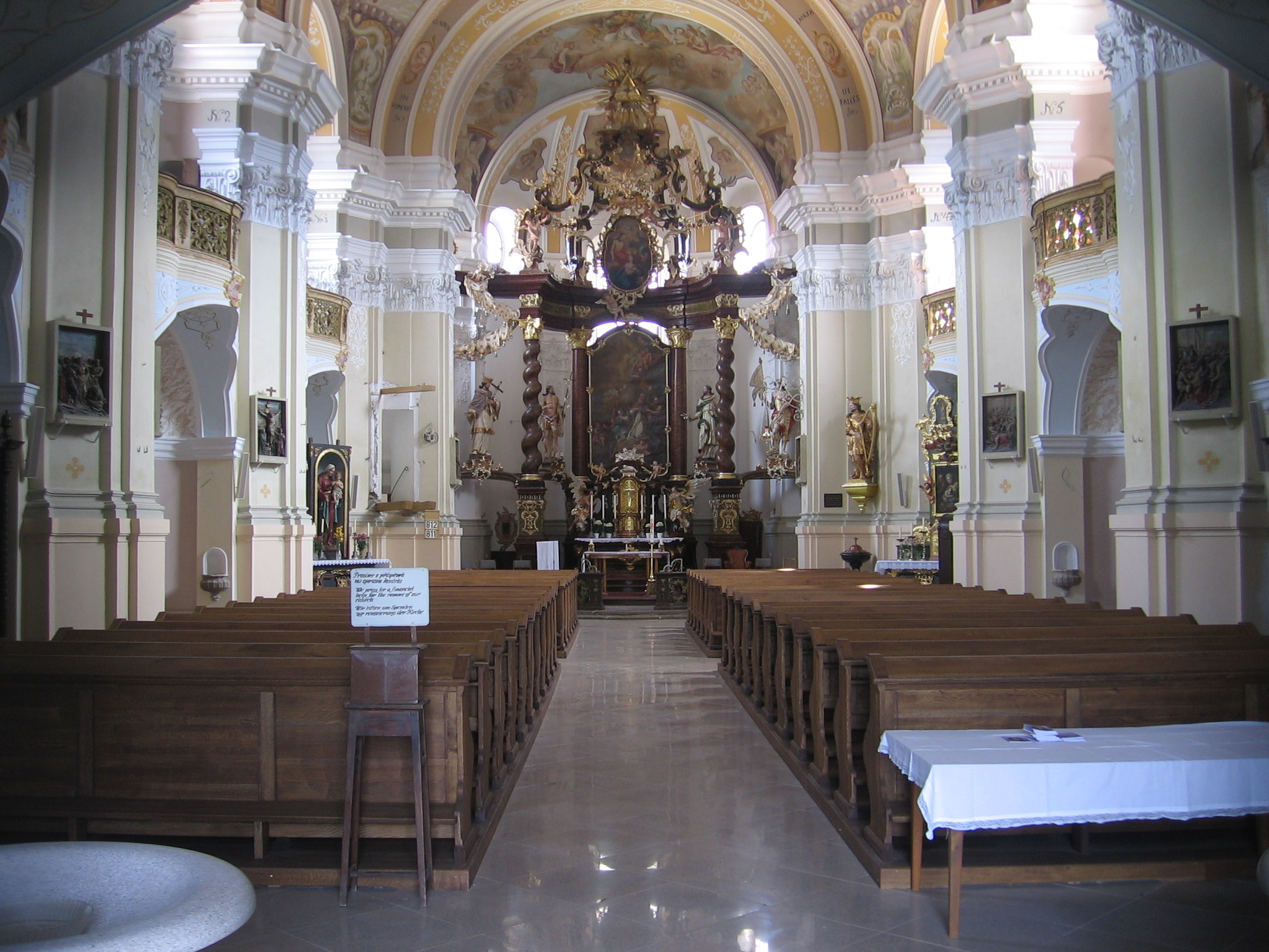 Interiér kostela sv. Mikuláše na nám. Republiky, Bor, okr.Tachov